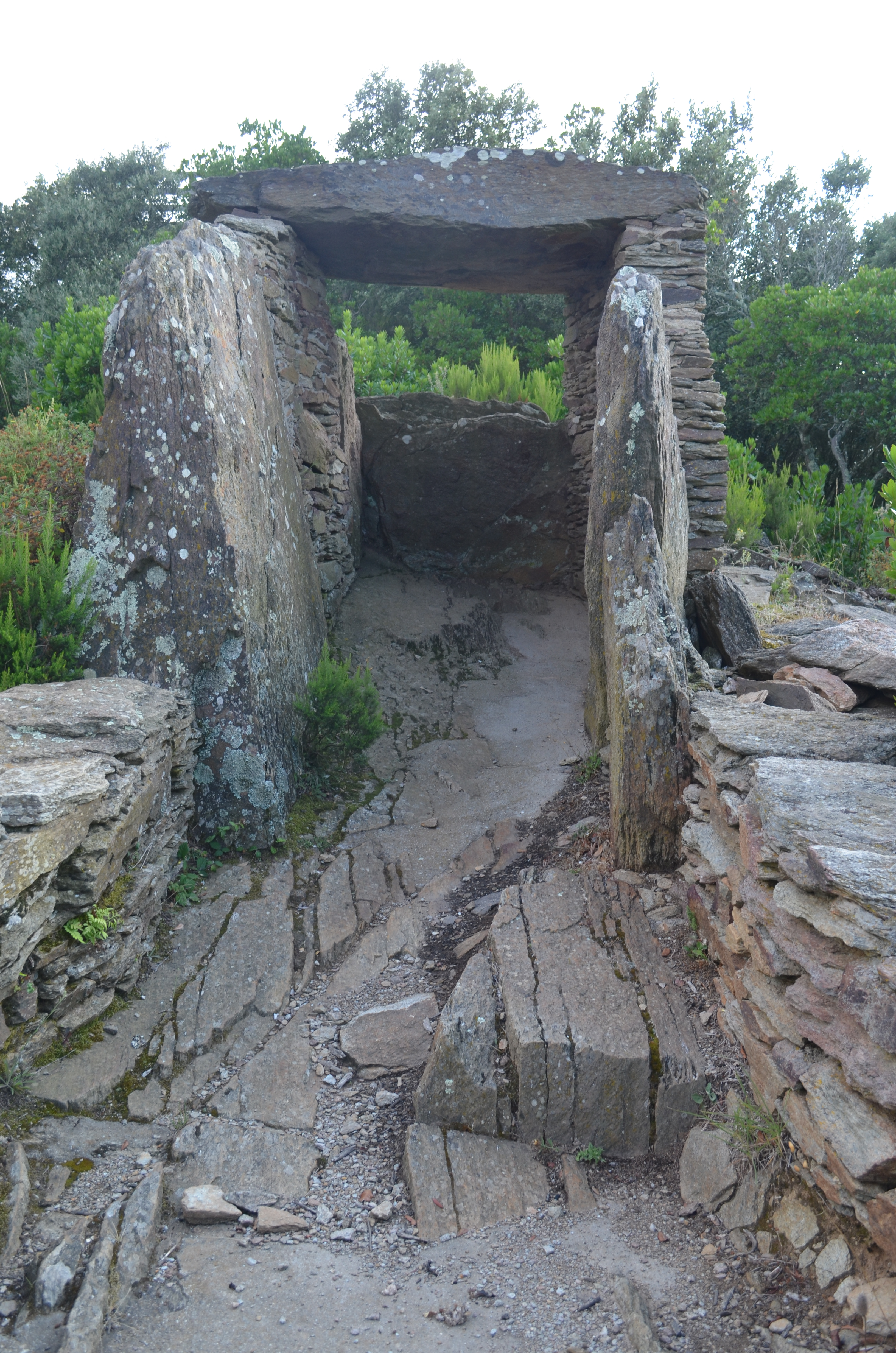 Puig d'Arques, dolmen